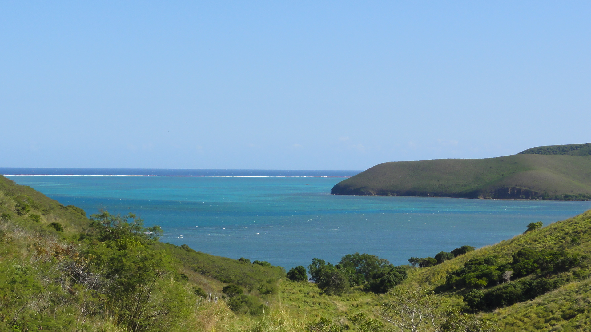 Vuee sur la Baie de Gouaro